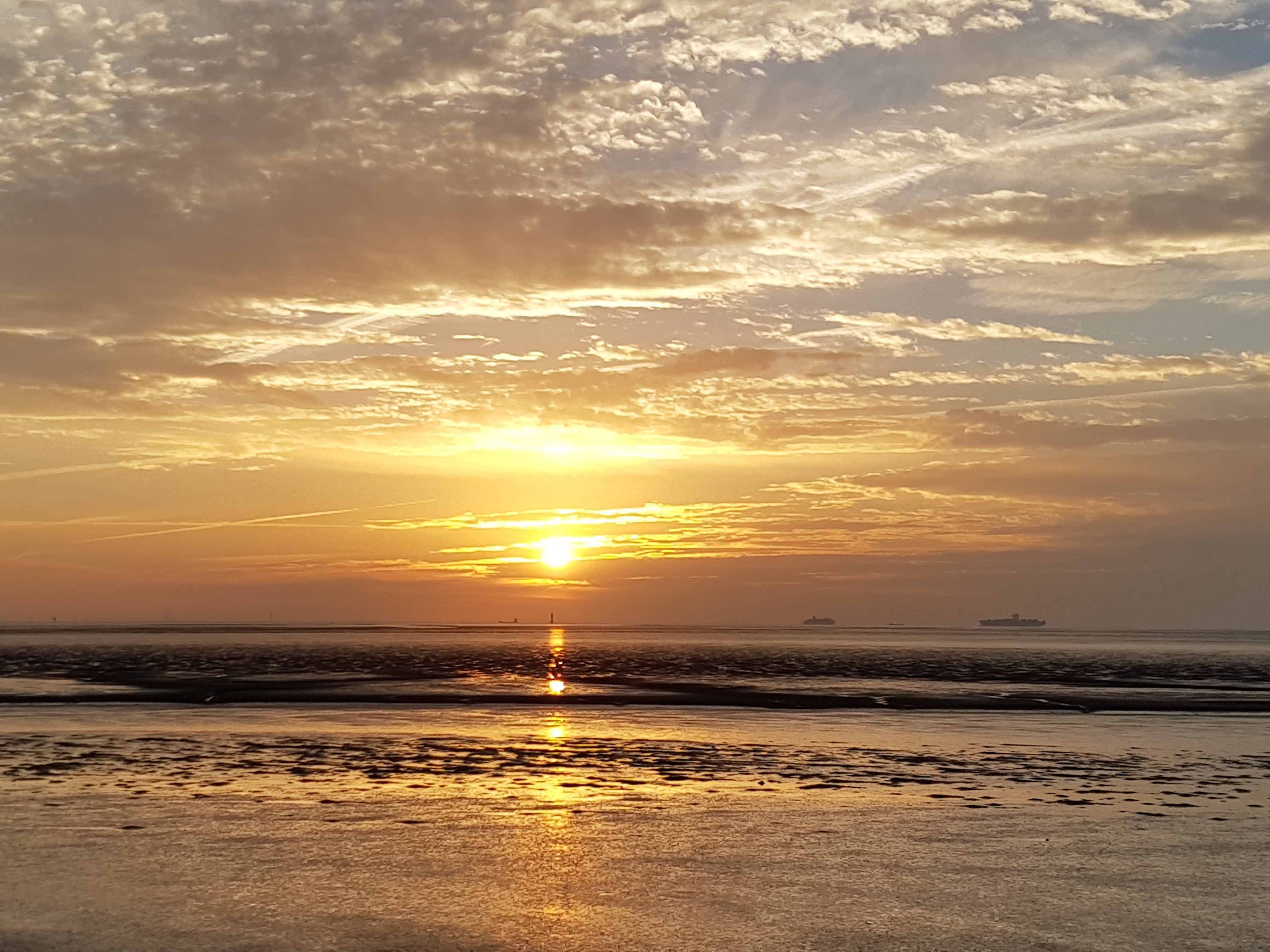 Das Weltnaturerbe Wattenmeer bei Wremen /Wurster Nordseeküste